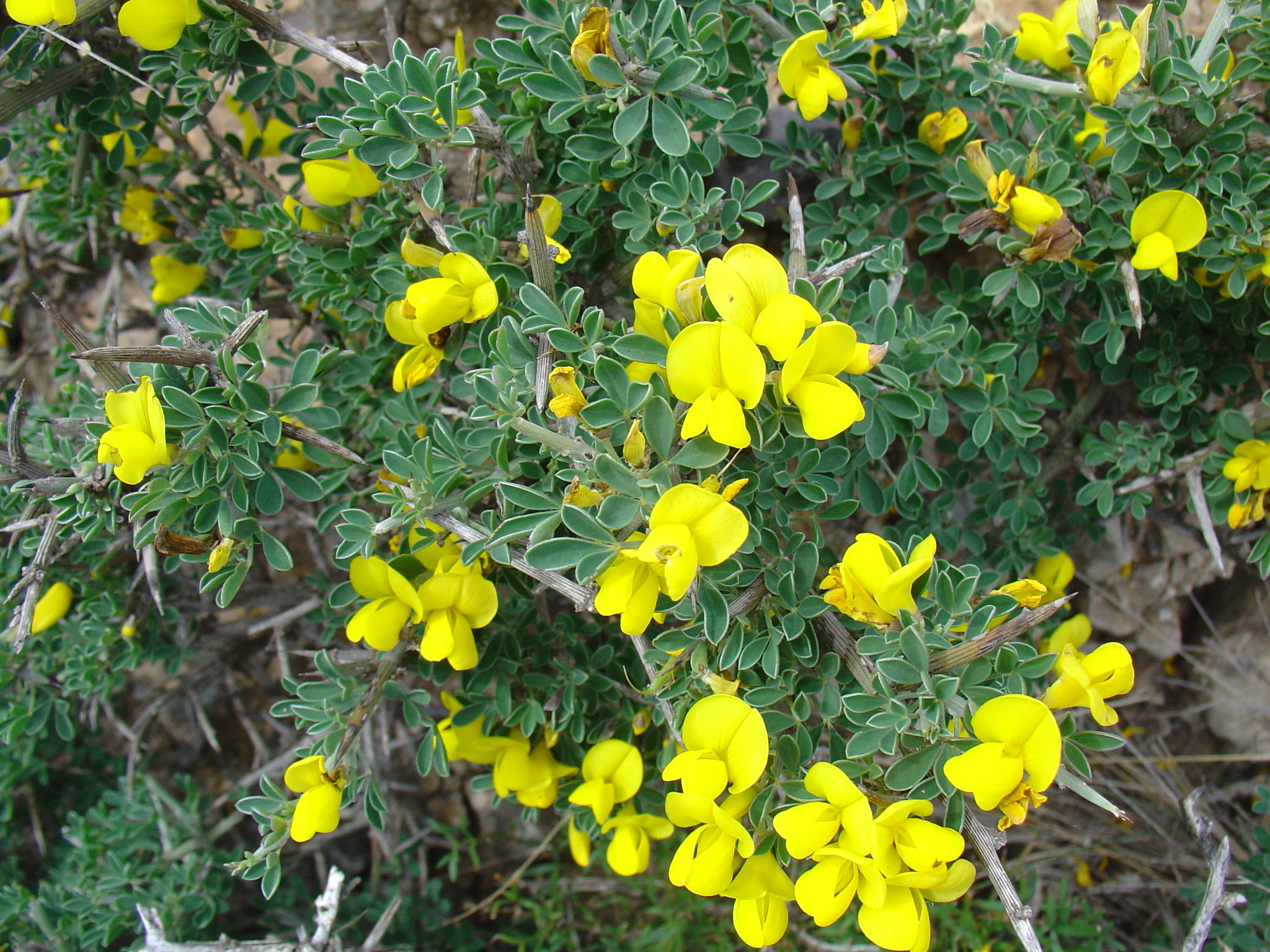 Calicotome intermedia (Cytisus infestus subsp. intermedia/(Calicotome infesta subsp.intermedia)) from Sª del Roldán, Cartagena, Murcia, Spain